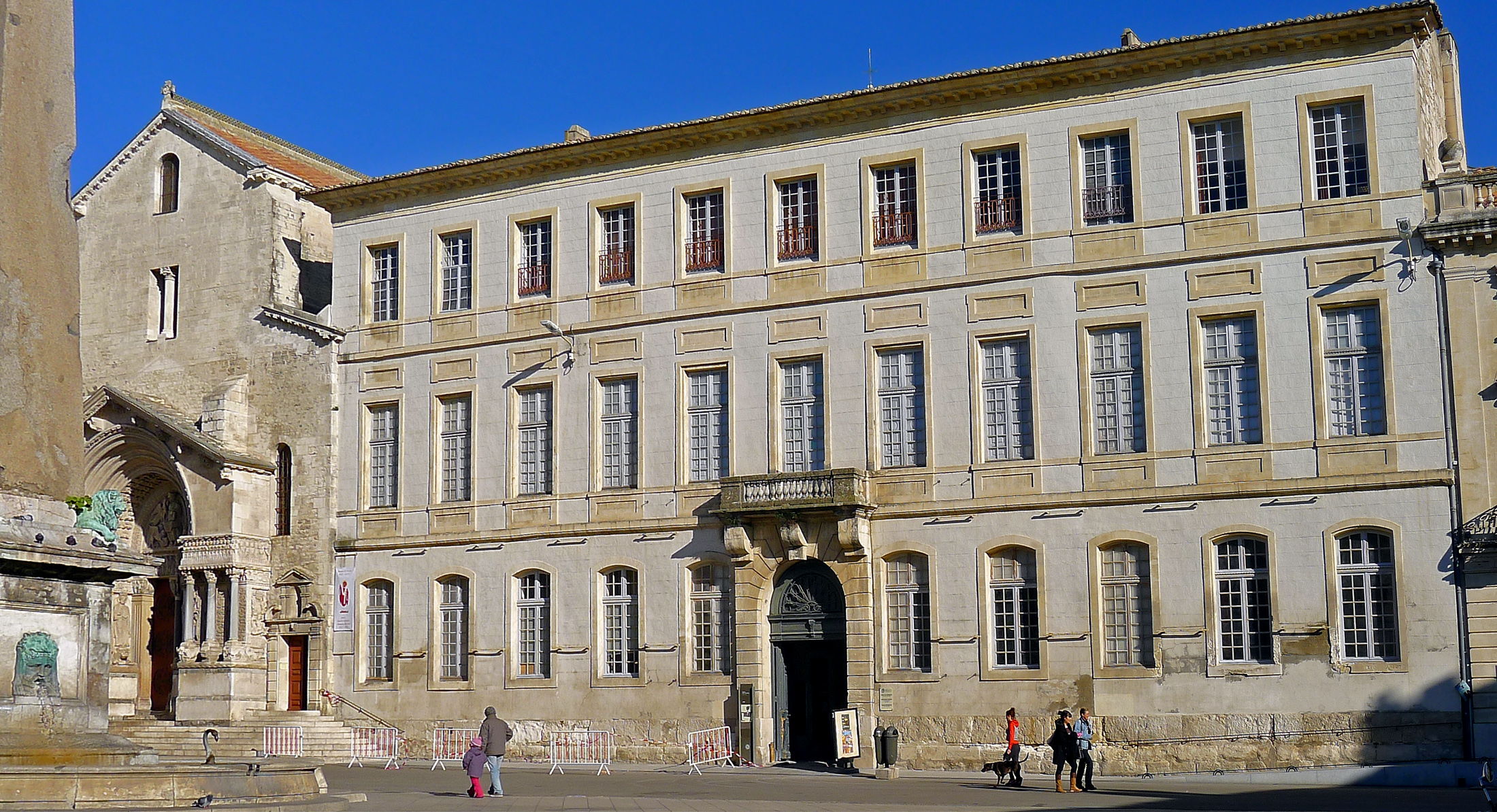 Palais archiépiscopal, place de la République - Arles (France) .